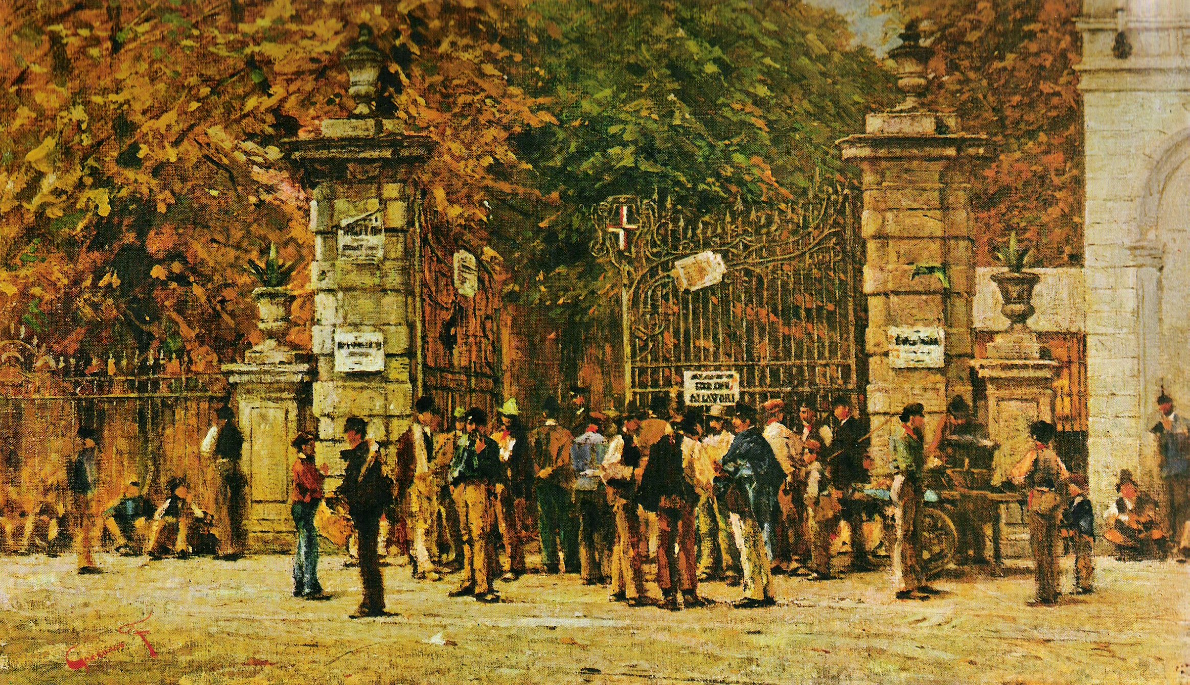 Filippo Carcano - L'ora di riposo durante i lavori dell'Esposizione del 1881 (1887-cm 69x120) Milano - Galleria d'Arte moderna